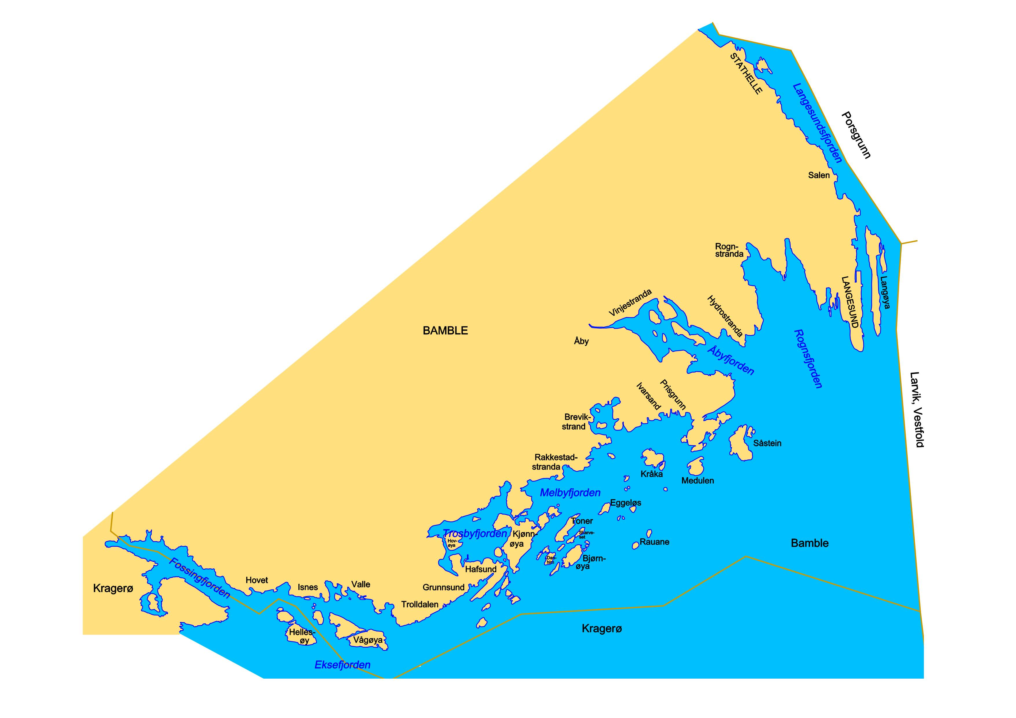 Kart over Bambles skjærgård